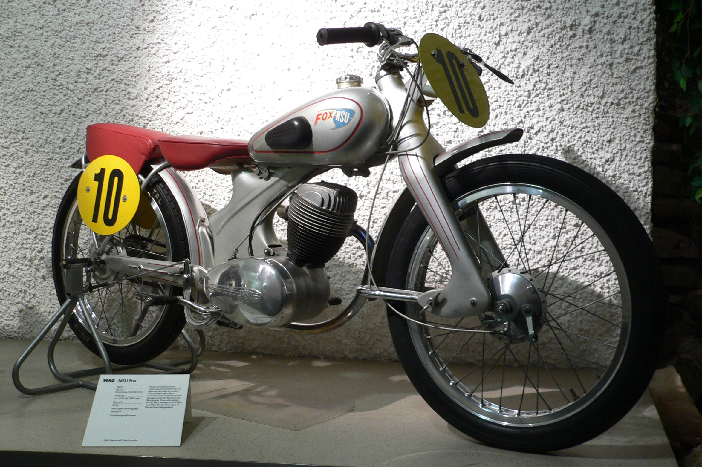 Motorbike "NSU Fox" (1950) at the Deutsches Zweirad- und NSU-Museum (98 cm³, Einzylinder-Viertakt (ohv), 7,5 PS bei 7.000 U/Min., 65 Kg, 100 Km/h)